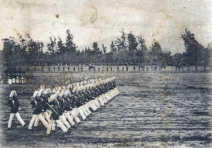 La Parada Militar o Gran Parada Militar en Honor a las Glorias del Ejército de Chile es un desfile militar que se efectúa en Chile en el Parque O'Higgins de la ciudad de Santiago, todos los días 19 de septiembre para conmemorar el "Día de las Glorias del Ejército de Chile".